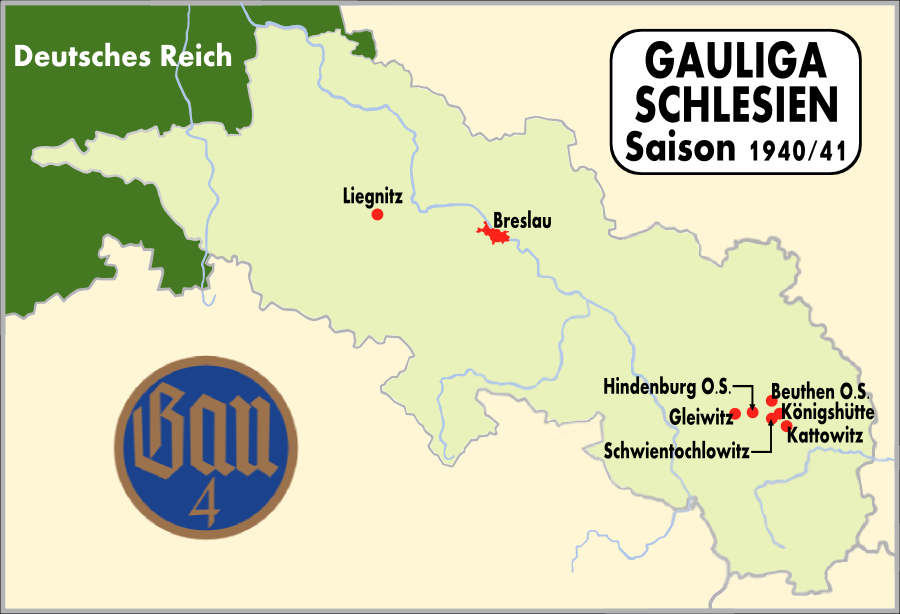 Spielorte der Gauliga Schlesien 1940/41. Schläsch: Spielurte der Gauliga Schläsing 1940/41.